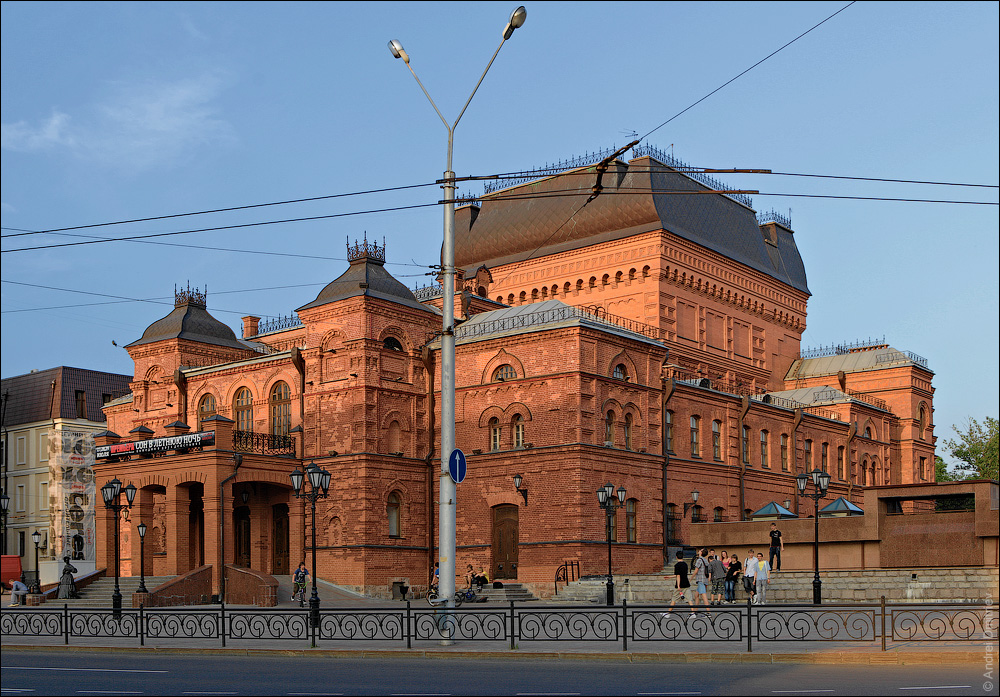 Магілёўскія відарысы